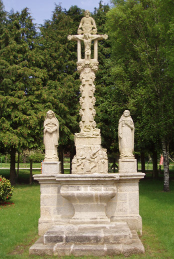 Calvaire de Melrand